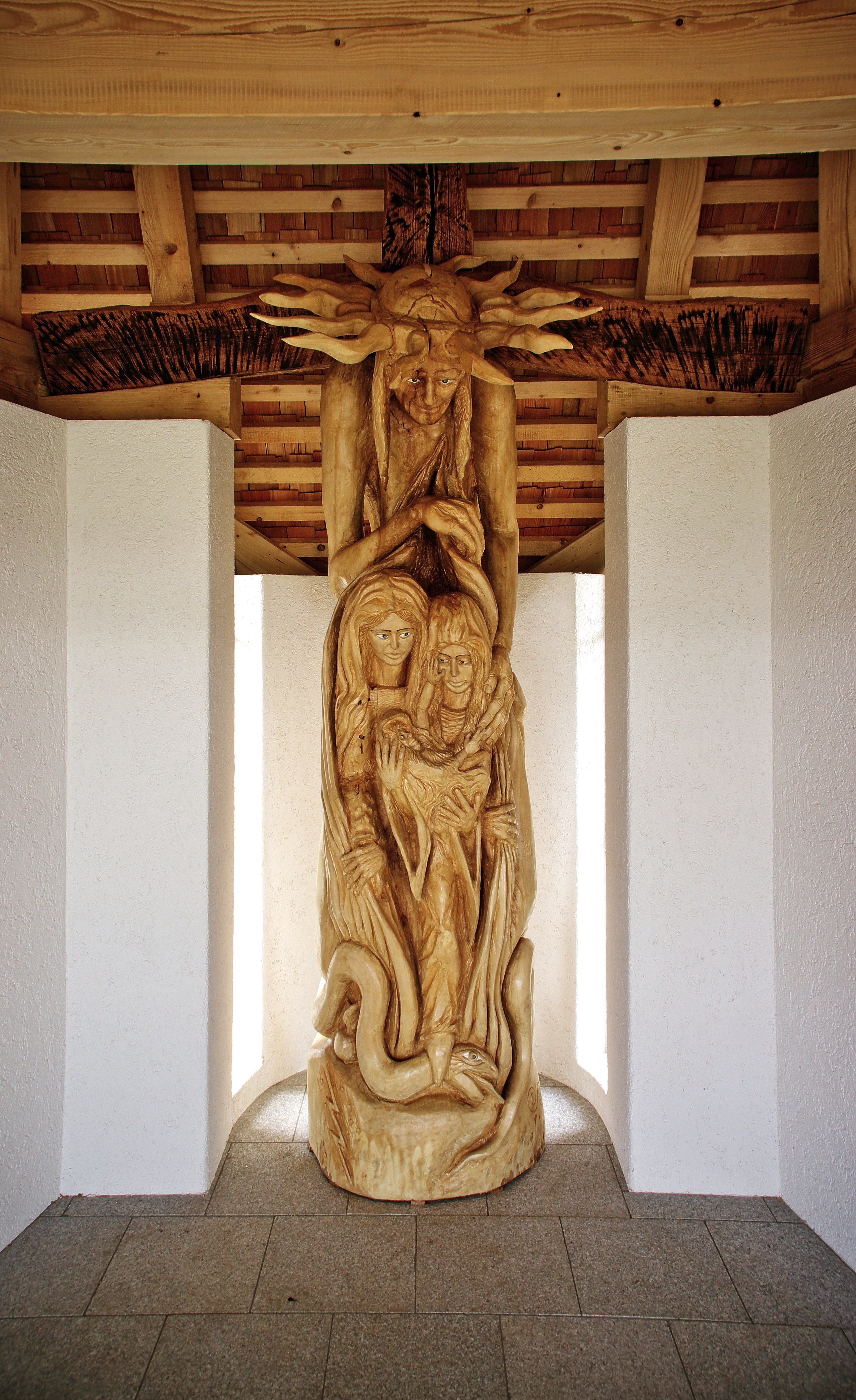 Das geschnitzte Kreuz in der Anna Kapelle